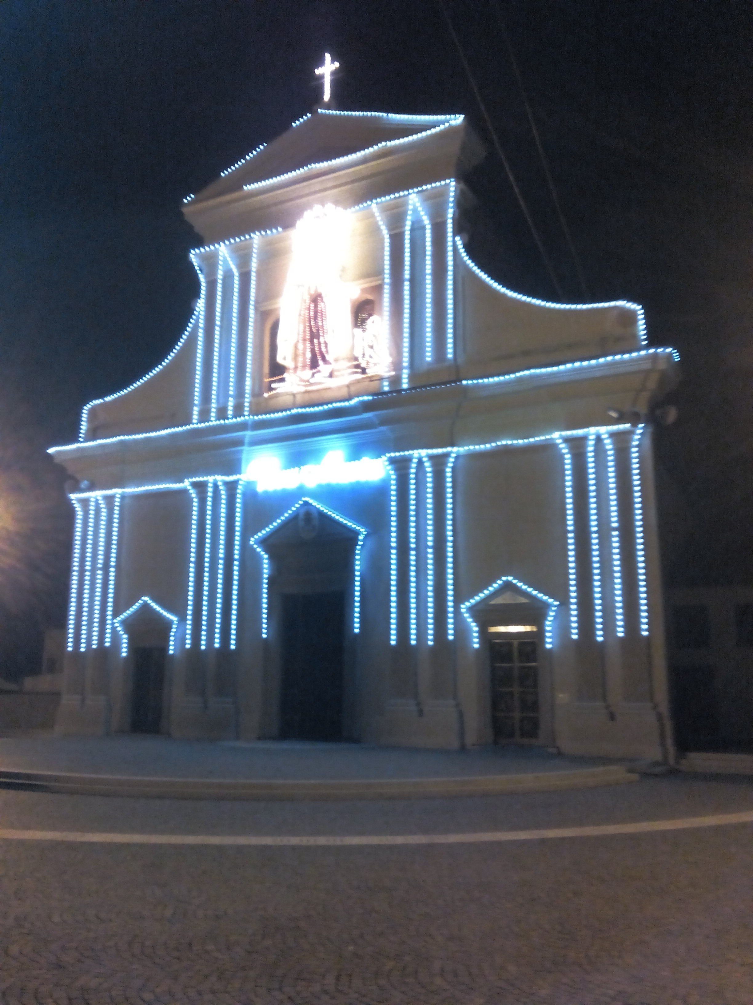 10 giugno 2018 Festa a Miracoli, Casalbordino